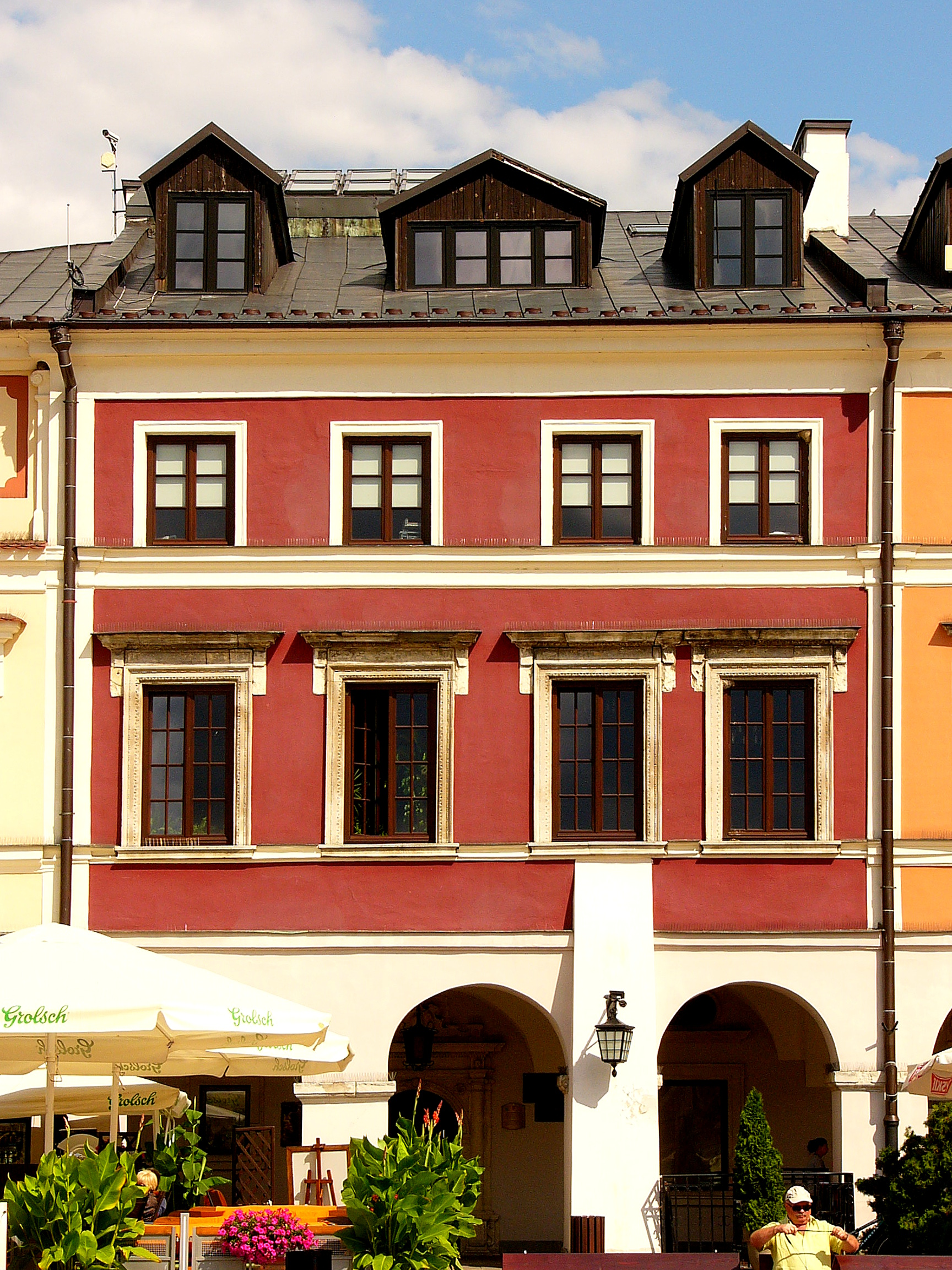 Zamość, Kamienica "Birkowskiego" (z oficyną boczną) (1606-16 r.)